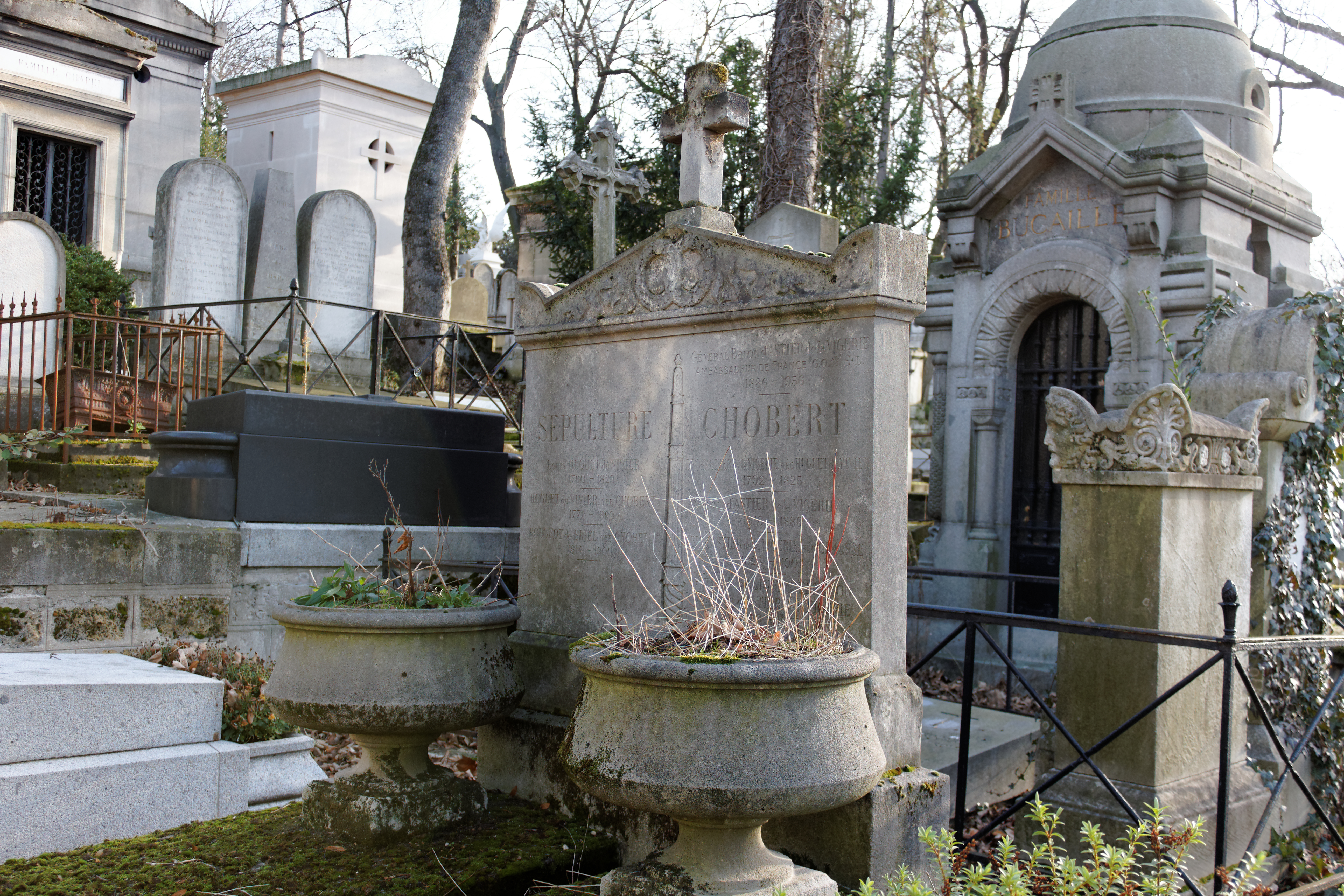 Vue d'ensemble